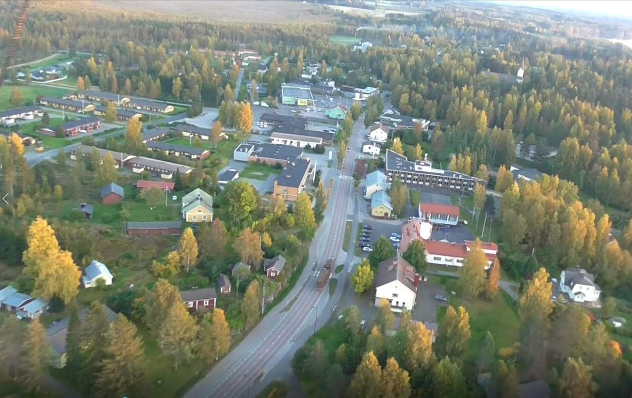 Ilmakuva Hankasalmen kirkonkylältä. Näkymä Keskustien yltä pohjoisesta etelään päin.